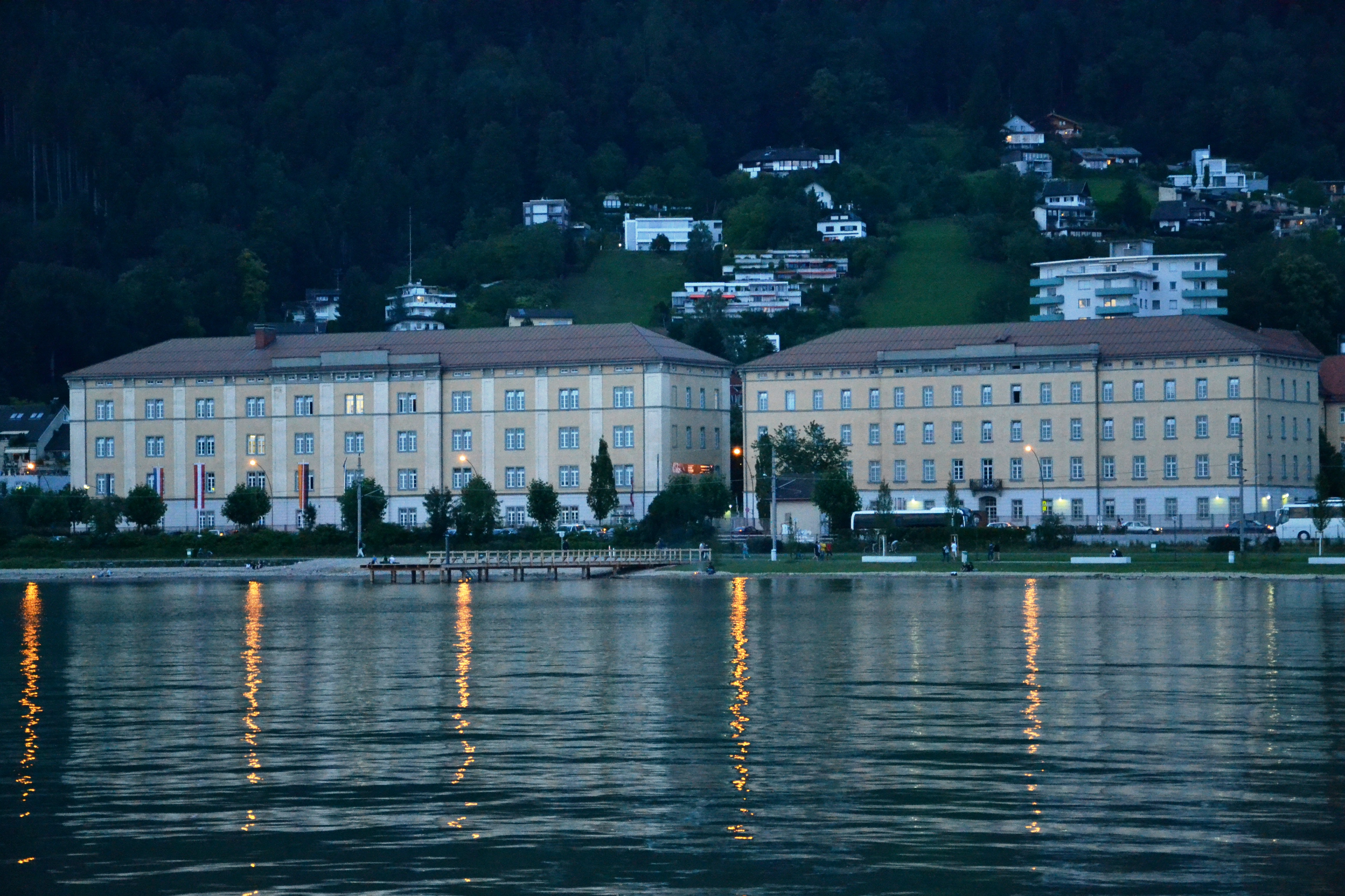 Kommandogebäude Oberst Bilgeri in Bregenz